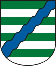 Wappen Niederfrohna